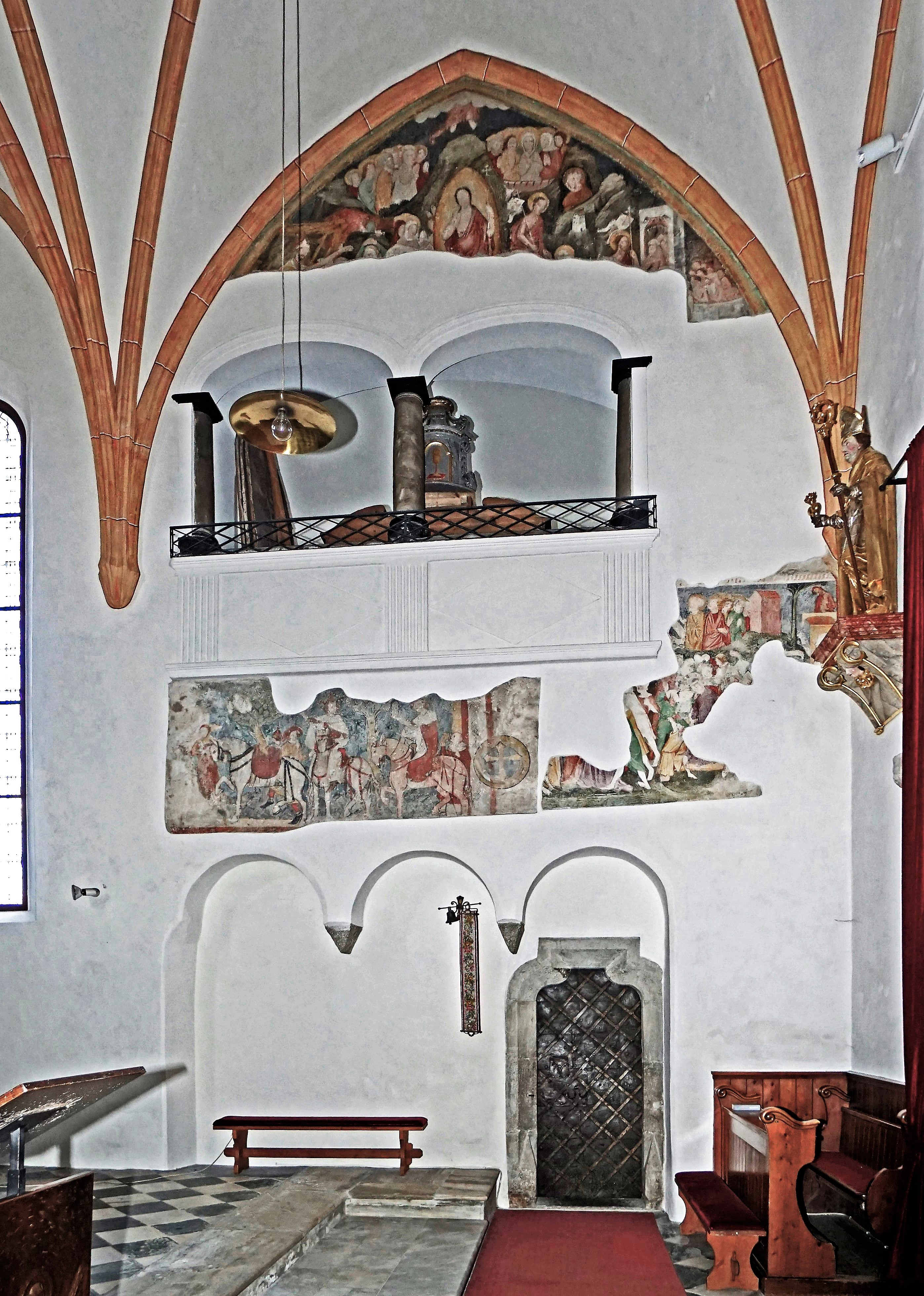 Stadtpfarrkirche Mariae Himmelfahrt (Maria Dorn), Teilansicht der Chorsüdwand mit Oratorium und Wandmalereiresten